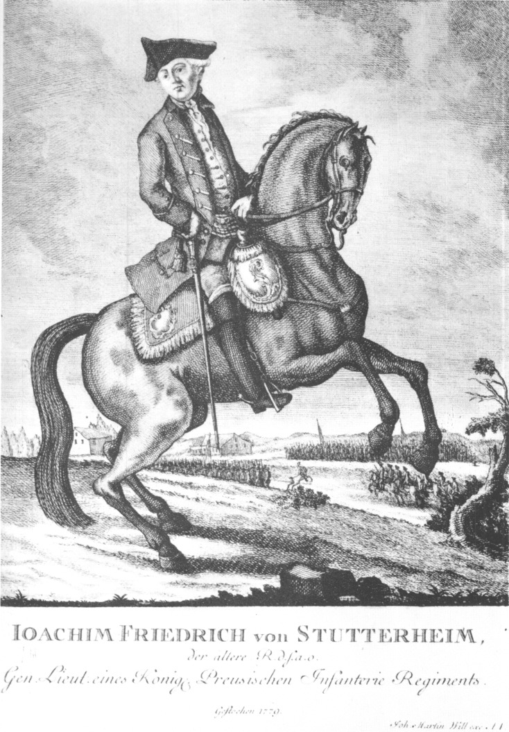 Joachim Friedrich von Stutterheim (02.11.1715-26.08.1783) Generalleutnant, Generalinspekteur der Infanterie, Gouverneur in Preußen